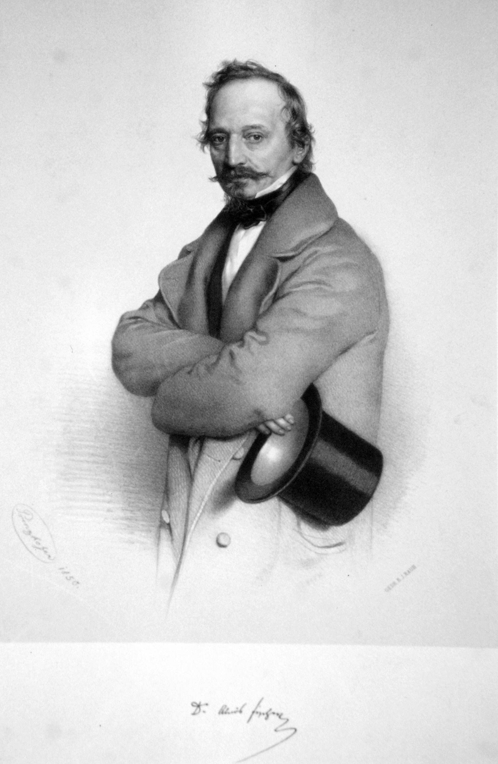 Alois Fischer (1795-1883), Dr. jur., Rechtsanwalt, Abgeordneter. Statthalter in Oberösterreich.Lithographie von August Prinzhofer, 1846